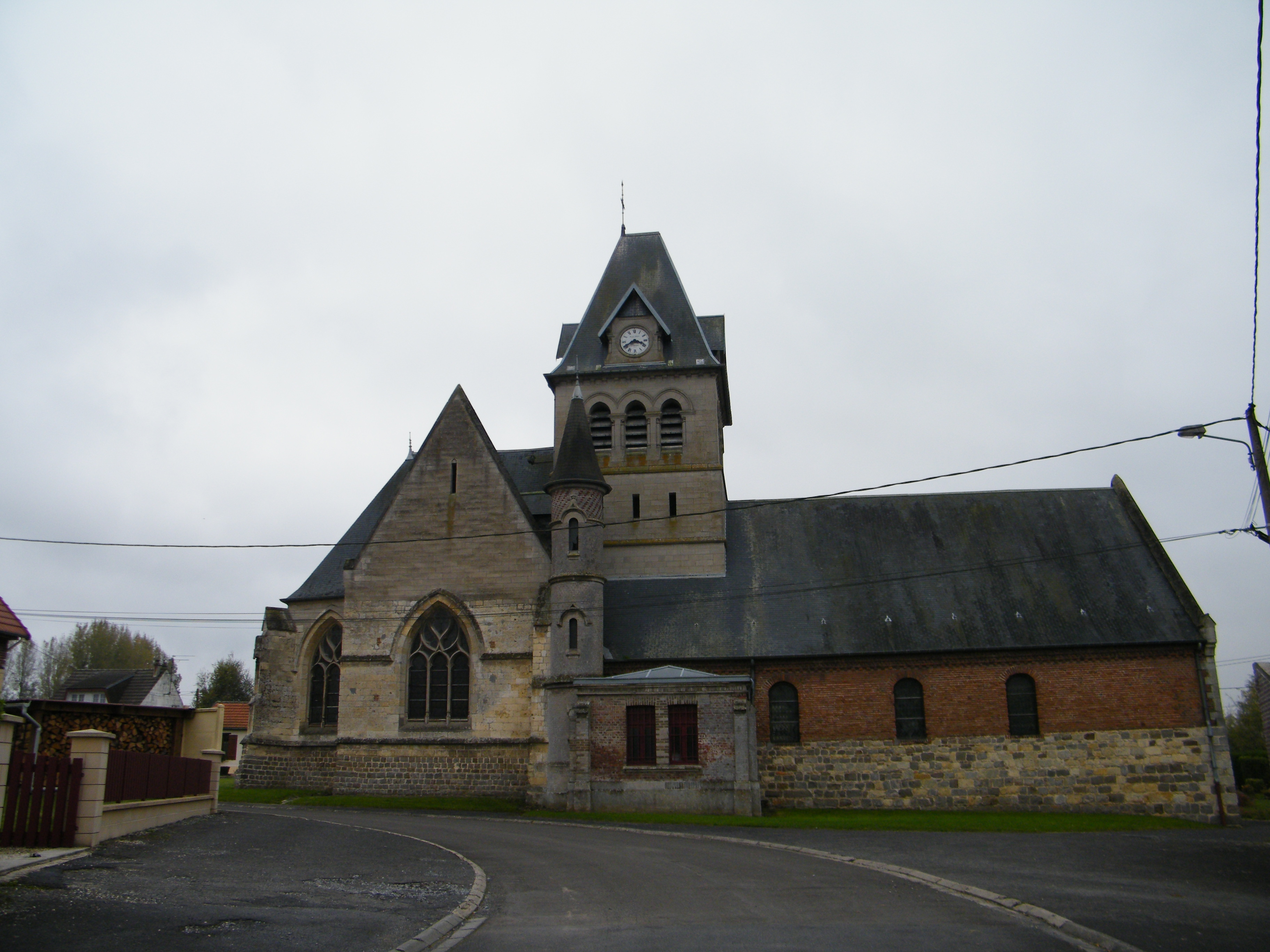 église.